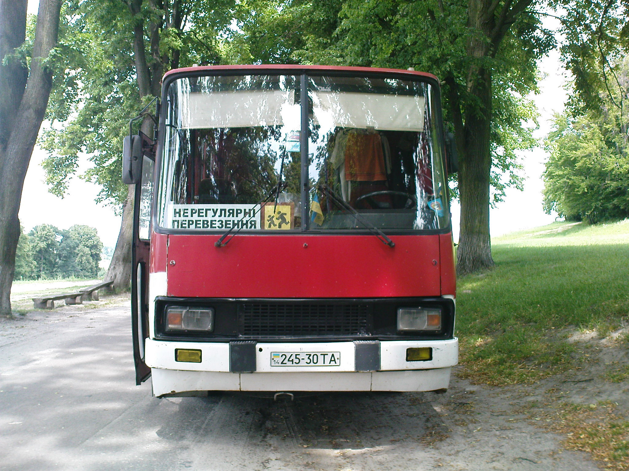 Ікарус 250 біля Брюховичів